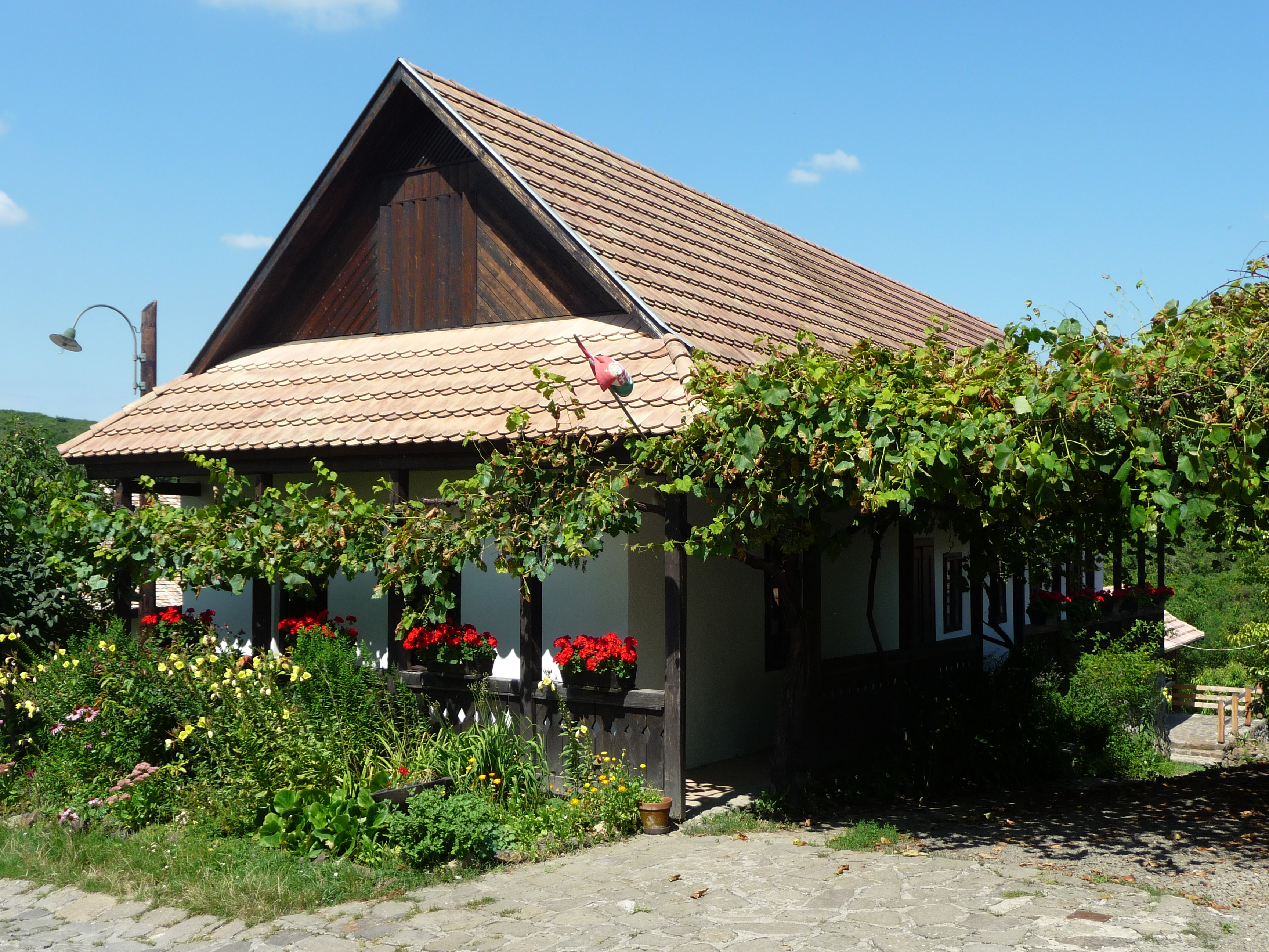 Hollókő, Kossuth L. út 73.